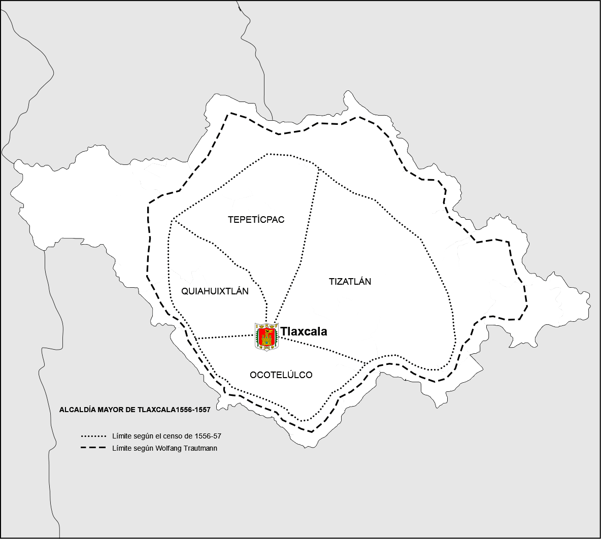 En 1540 la provincia de Tlaxcala fue dividida en cuatro cabeceras respetando las distribuciones de los antiguos señoríos.